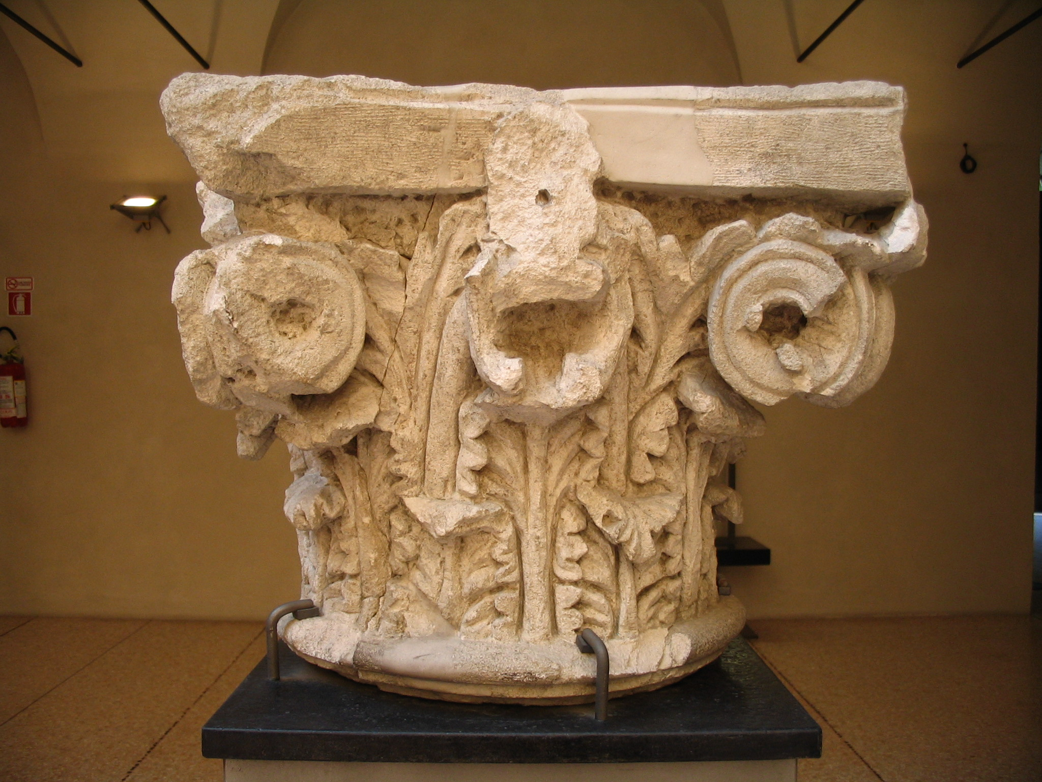 Capitello corinzio proveniente da un tempio romano. Lapidario estense di Modena.